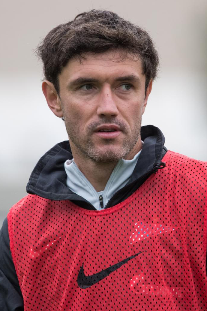 18.02.2018. Италия, Рим, Центр олимпийской подготовки имени Джулио Онести. «Газпром» — тренировочные сборы в Италии: 18 февраля, утренняя тренировка.